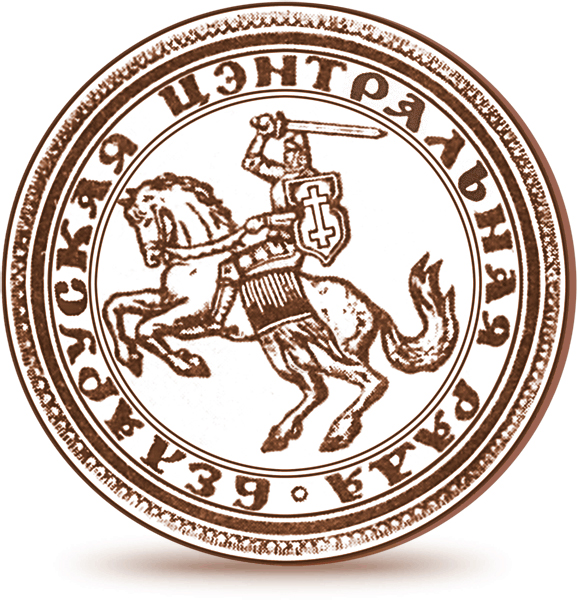 Печать Белорусской Центральной Рады. 1943. Первоисточник: Цітоў А. Наш сімвал — Пагоня: Шлях праз стагоддзі. — Мн.: Полымя, 1993.— 40 с.: іл. ISBN 5-345-00740-3.